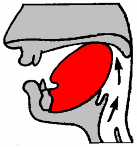 velarer Laut in der Phonetik (für die GNU FDL)